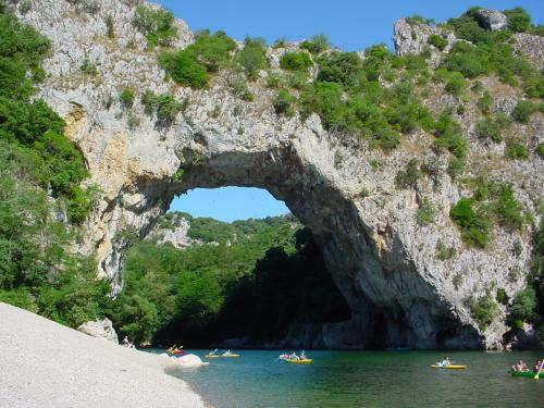 Pont d'Arc, Ardéche Fotografiert Juli 2004 Fotograf: Reinhard Kraasch Copyright Status: GNU Freie Dokumentationslizenz